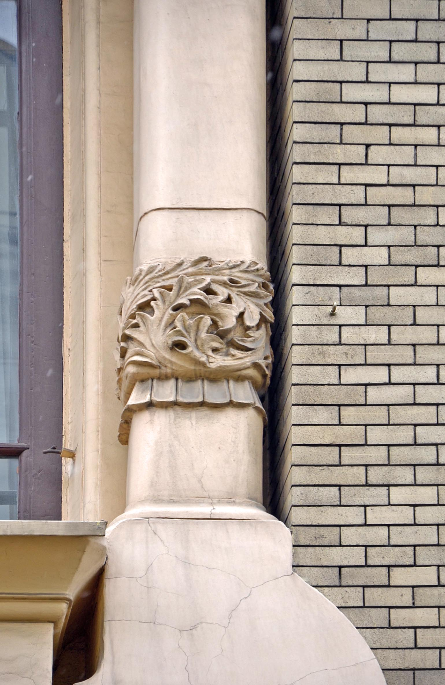 Особняк М. С. Саарбекова на Поварской улице в Москве. Деталь уличного фасада